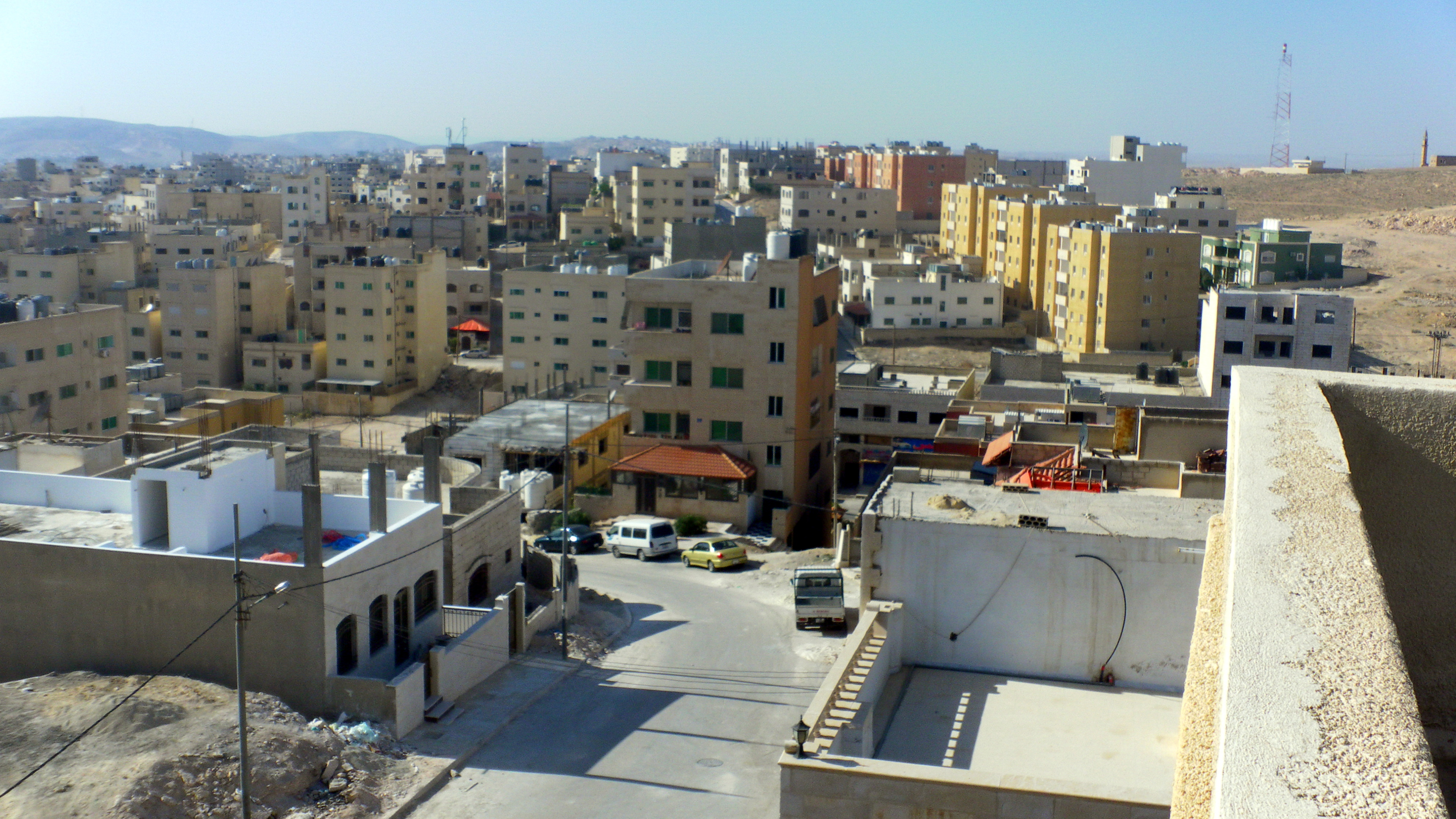 جبل طارق، الزرقاء.